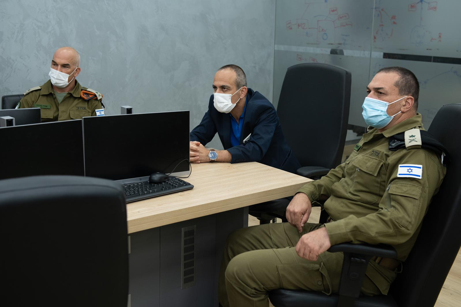 ביקור האלוף אייל זמיר, במטה פיקוד העורף, יחד עם הפרויקטור למאבק בנגיף הקורונה, פרופסור רוני גמזו, ובליווי מפקד פיקוד העורף, אלוף אורי גורדין.